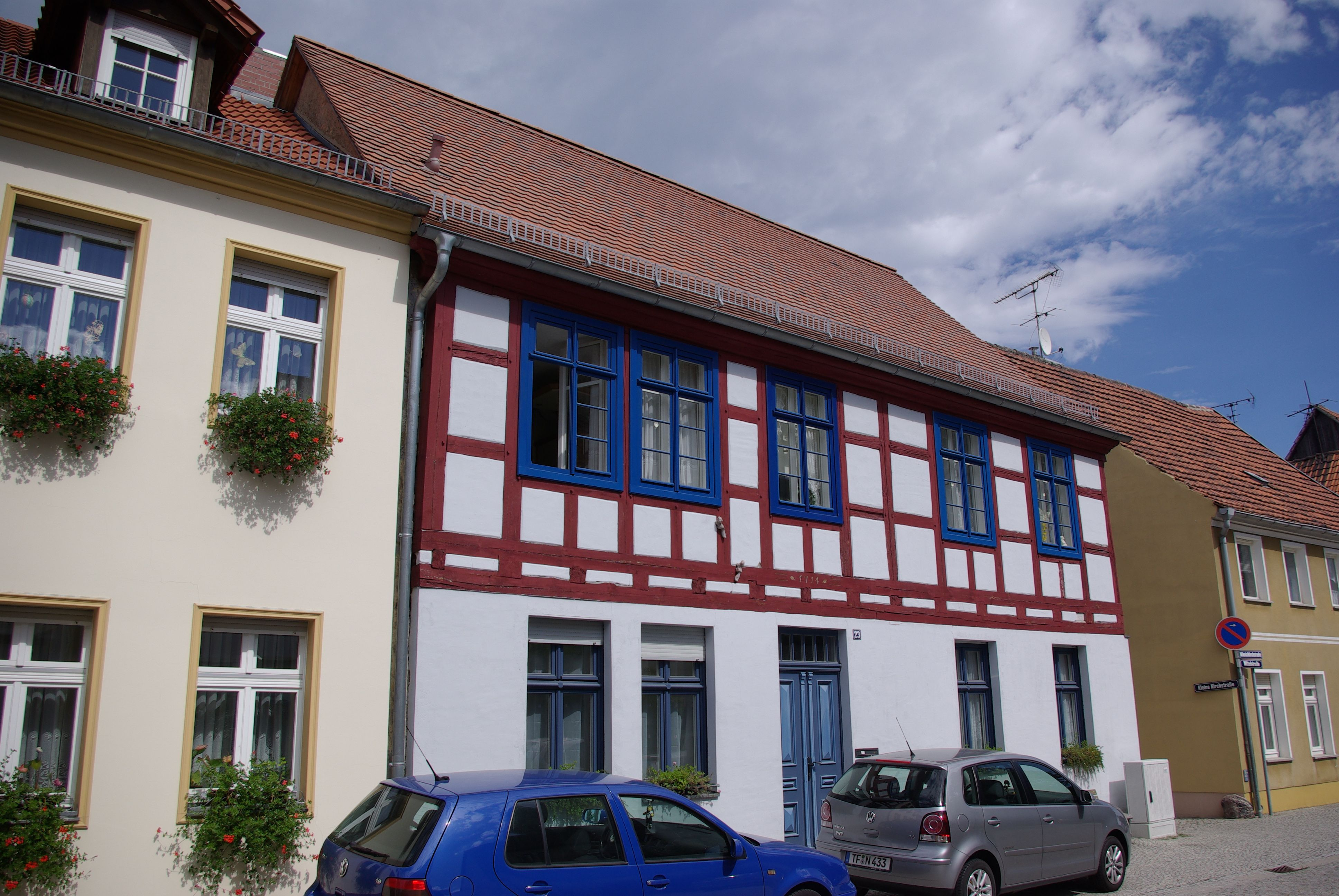 Jüterbog in Brandenburg. Das Haus in der Mittelstraße 23 steht unter Denkmalschutz.